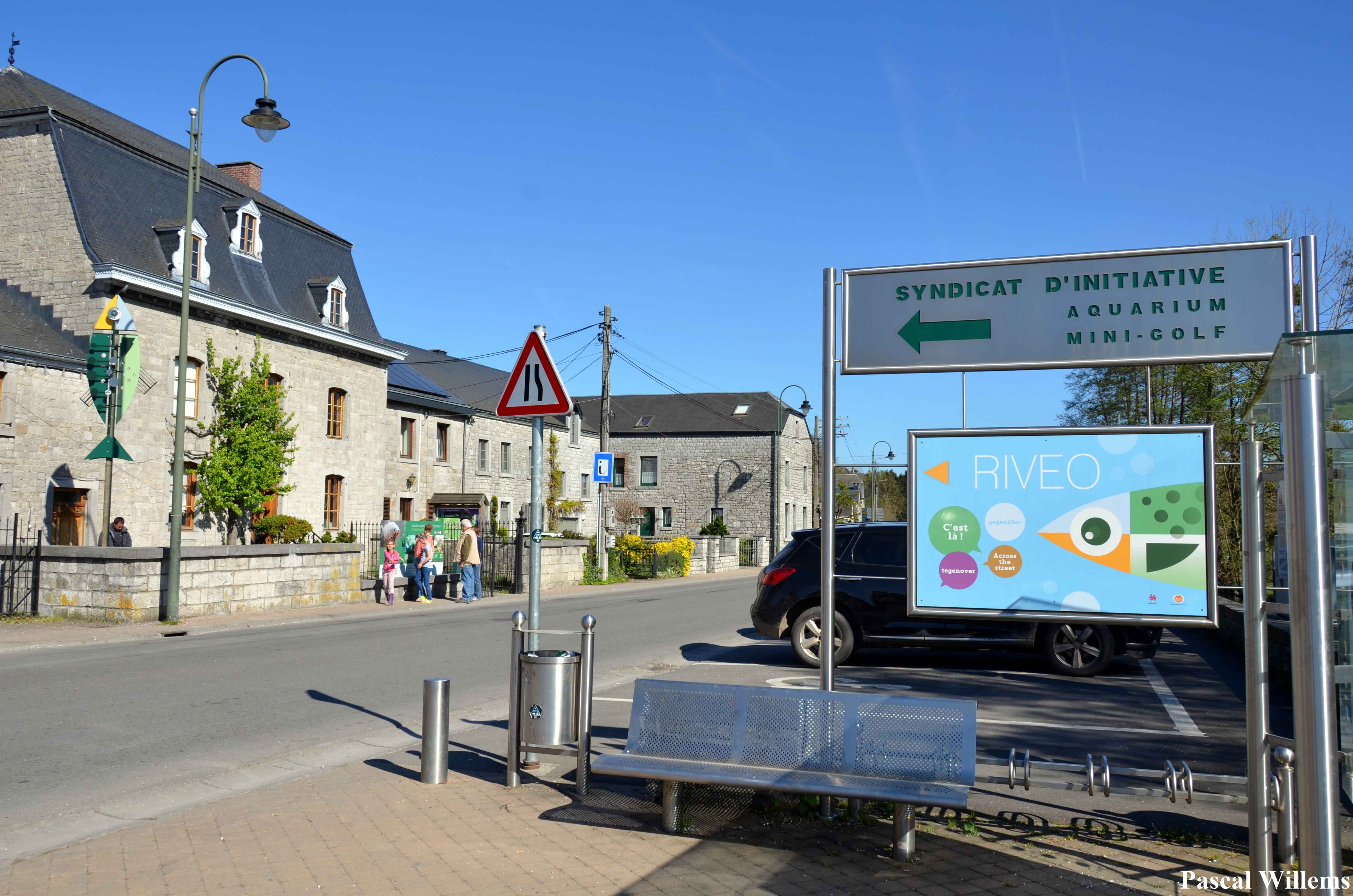 facade riveo